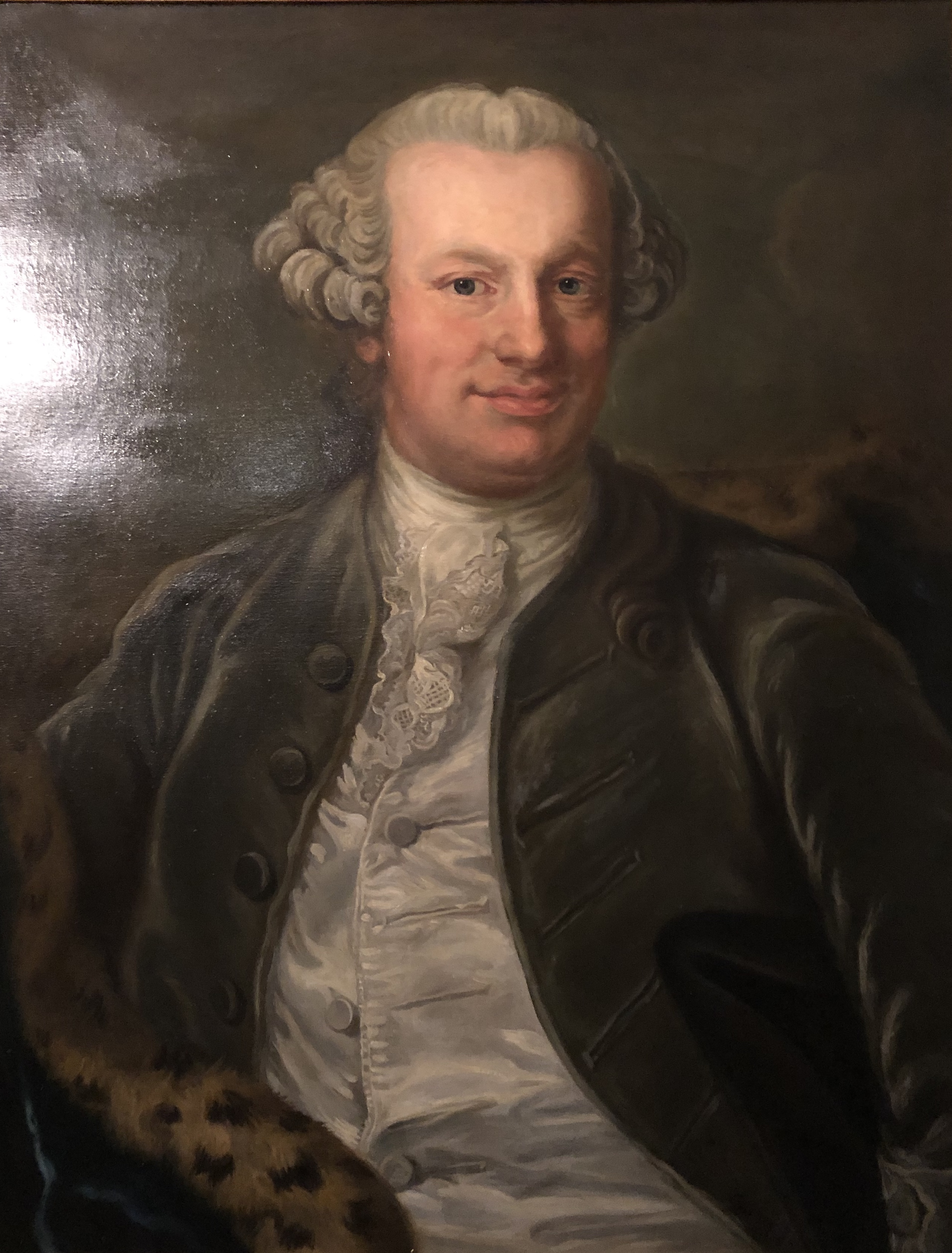 Målning föreställande handelsborgmästaren och grosshandlaren Johan Dreijer (1731-1797). Avporträtterad av Johan Henrik Scheffel ca 1760.